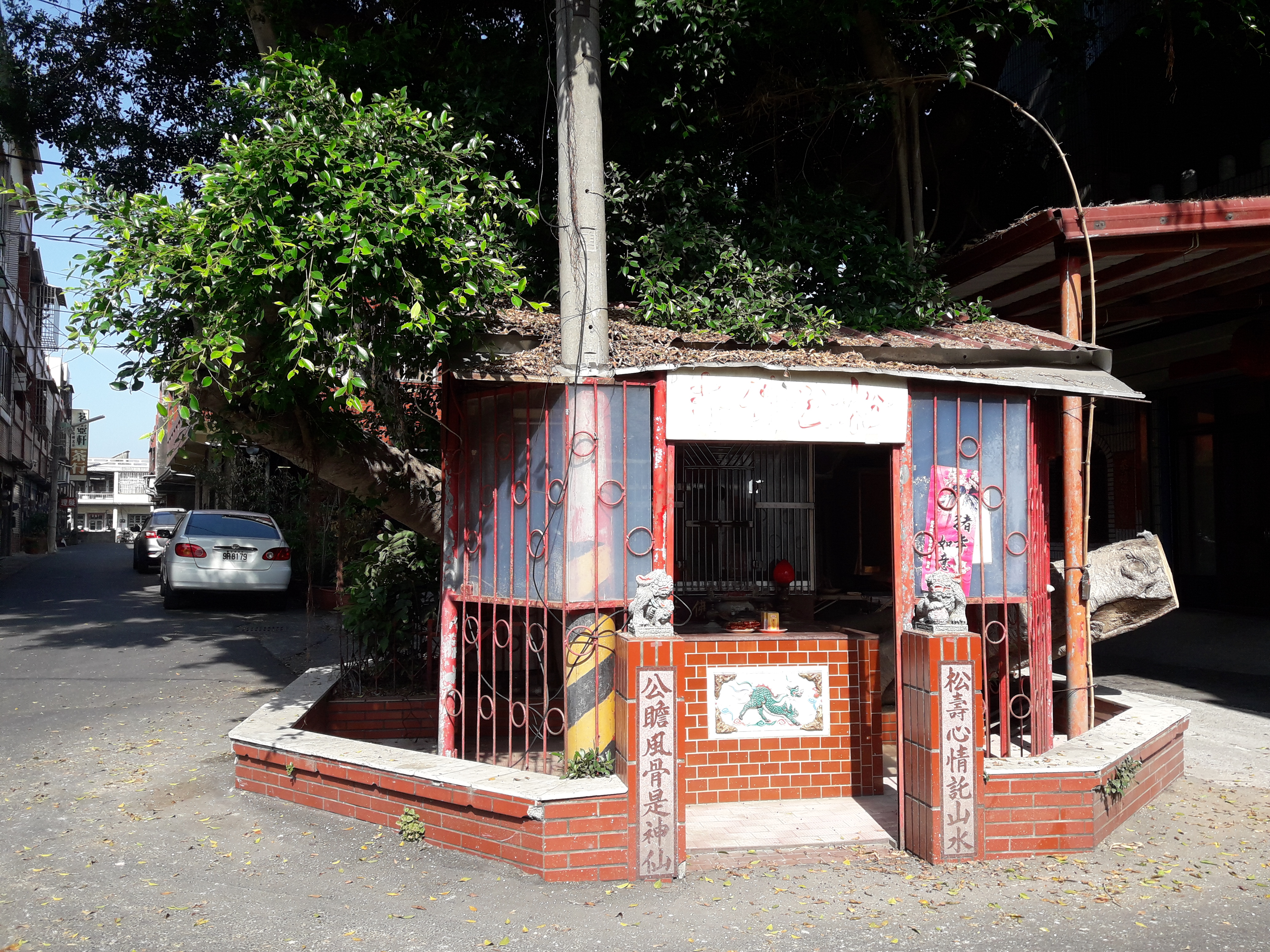 雲林縣虎尾鎮大屯松公佛寺。